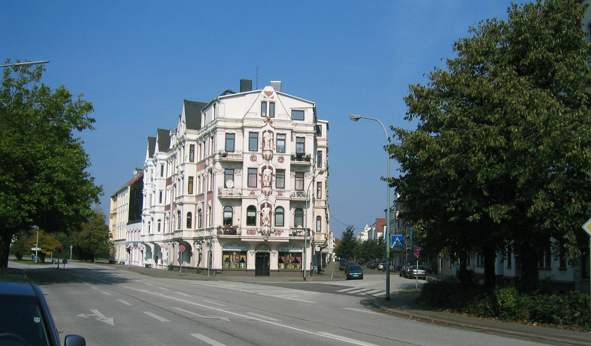 Lehe: Gaststätte „Rudelsburg“ am Anfang der Goethestraße und an der Grenze zum Stadtteil Mitte (Alt-Bremerhaven) Das abgebildete Objekt ist ein geschütztes Kulturdenkmal in der Freien Hansestadt Bremen, mit der Nr. 1560 beim Landesamt für Denkmalpflege registriert.